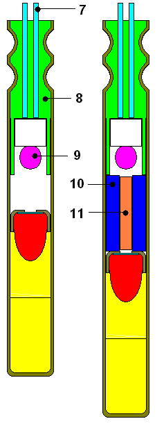 electrical blasting cap